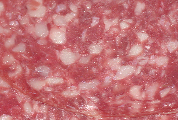 Nahaufnahme einer Scheibe Plockwurst aus Metzger-Herstellung